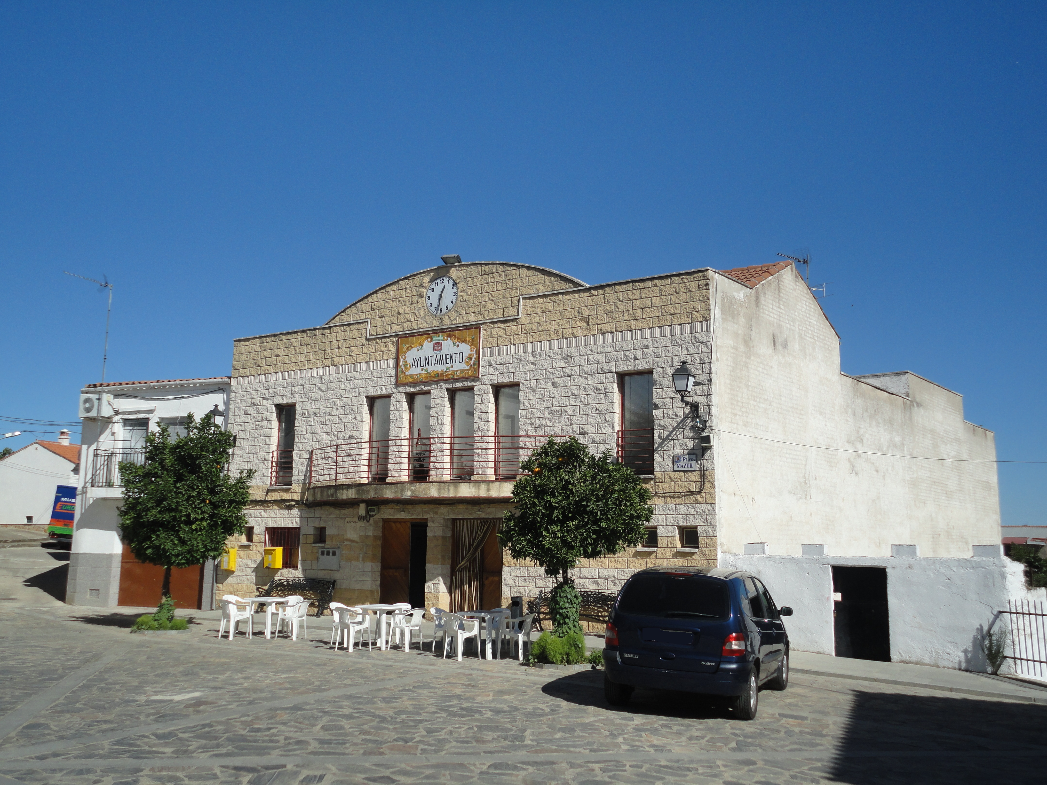 Casa consistorial de Santa Marta de Magasca, provincia de Cáceres, España.